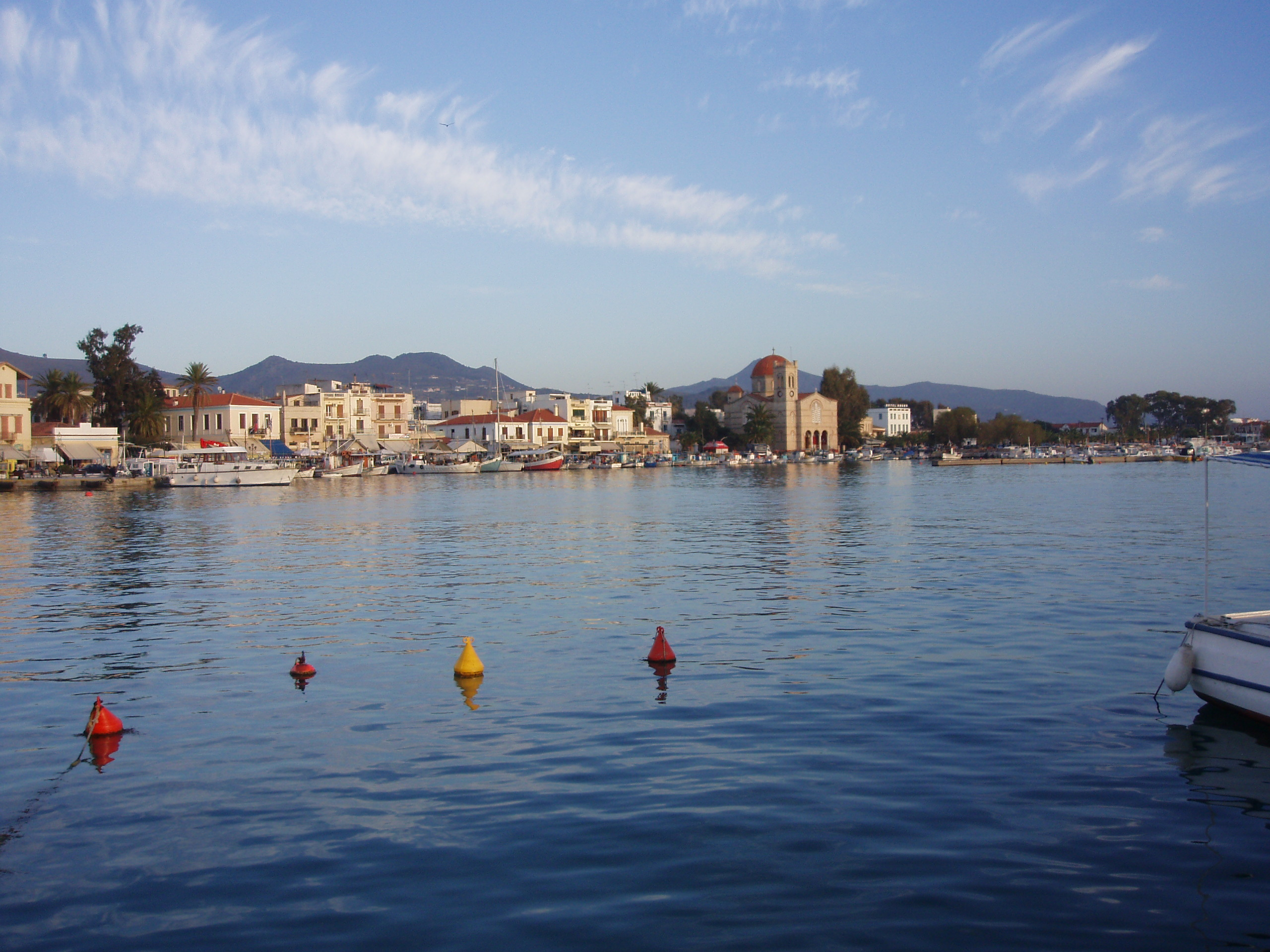 Blick vom Hafen auf Ägina